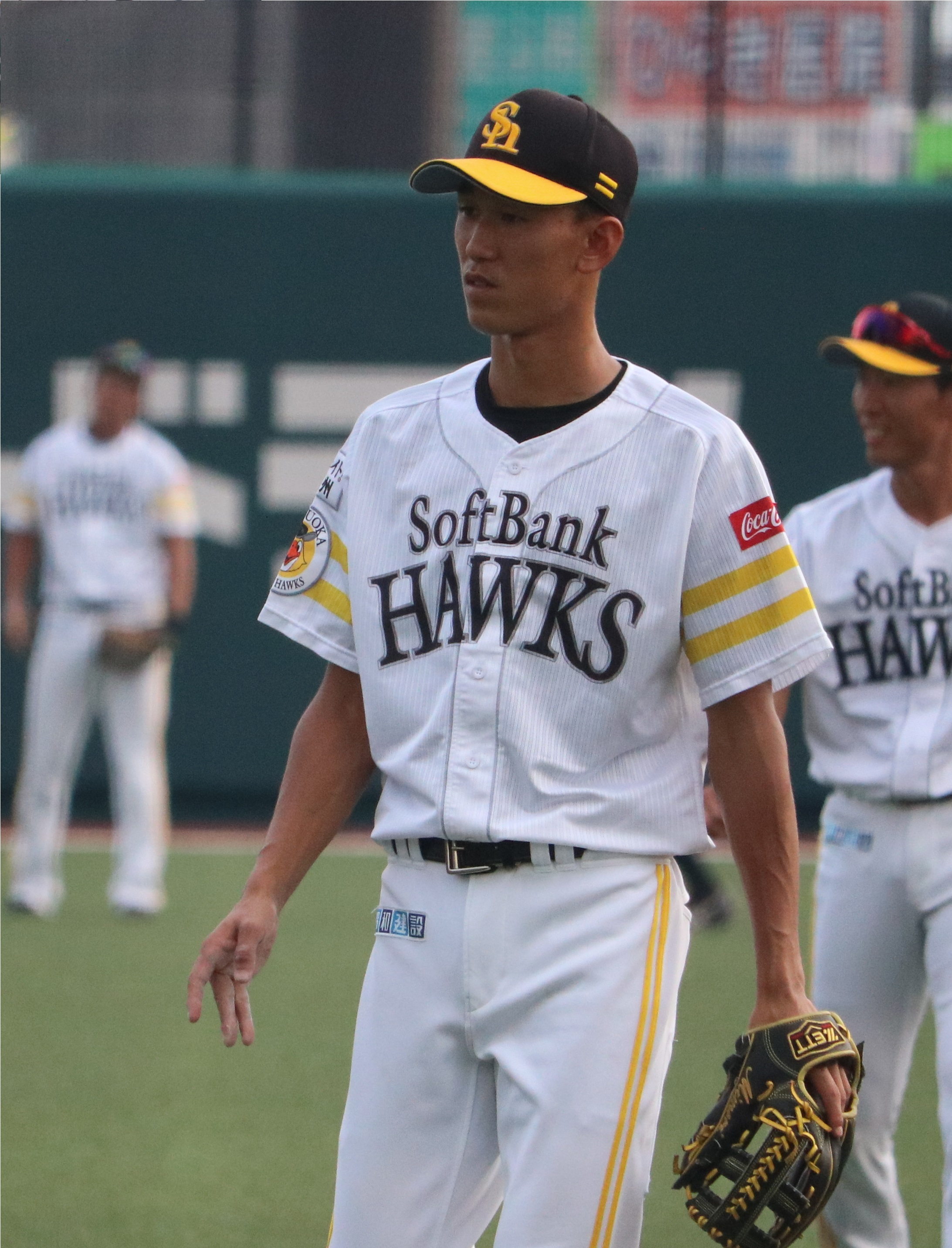 2017/7/28 ウエスタンリーグ